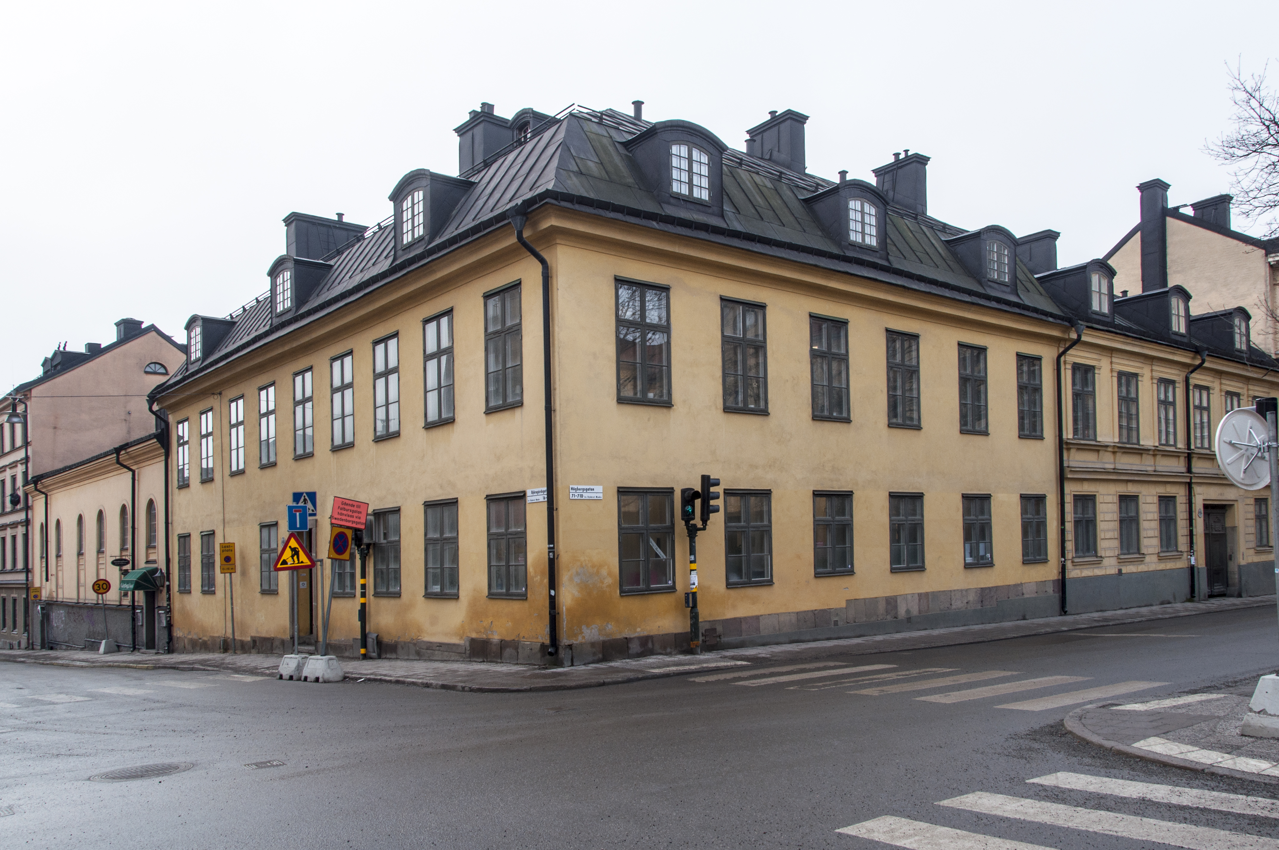 Dykärret mindre 10, Björngårdsgatan 14 / Högbergsgatan, Nybyggnadsår 1763 Johan Wilhelm Friese (Arkitekt), Johan Wilhelm Friese (Byggmästare), Sven Roos (Byggherre) Senare kontorshus i Nürnbergs Bryggeri.